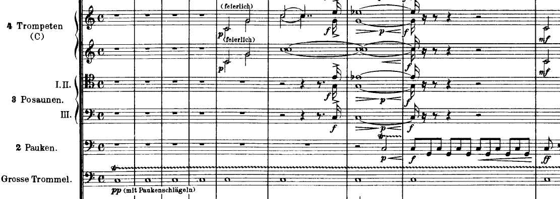 Strauss, Ainsi parlait Zarathoustra (1896), premières mesures du thème aux cuivres/percussions